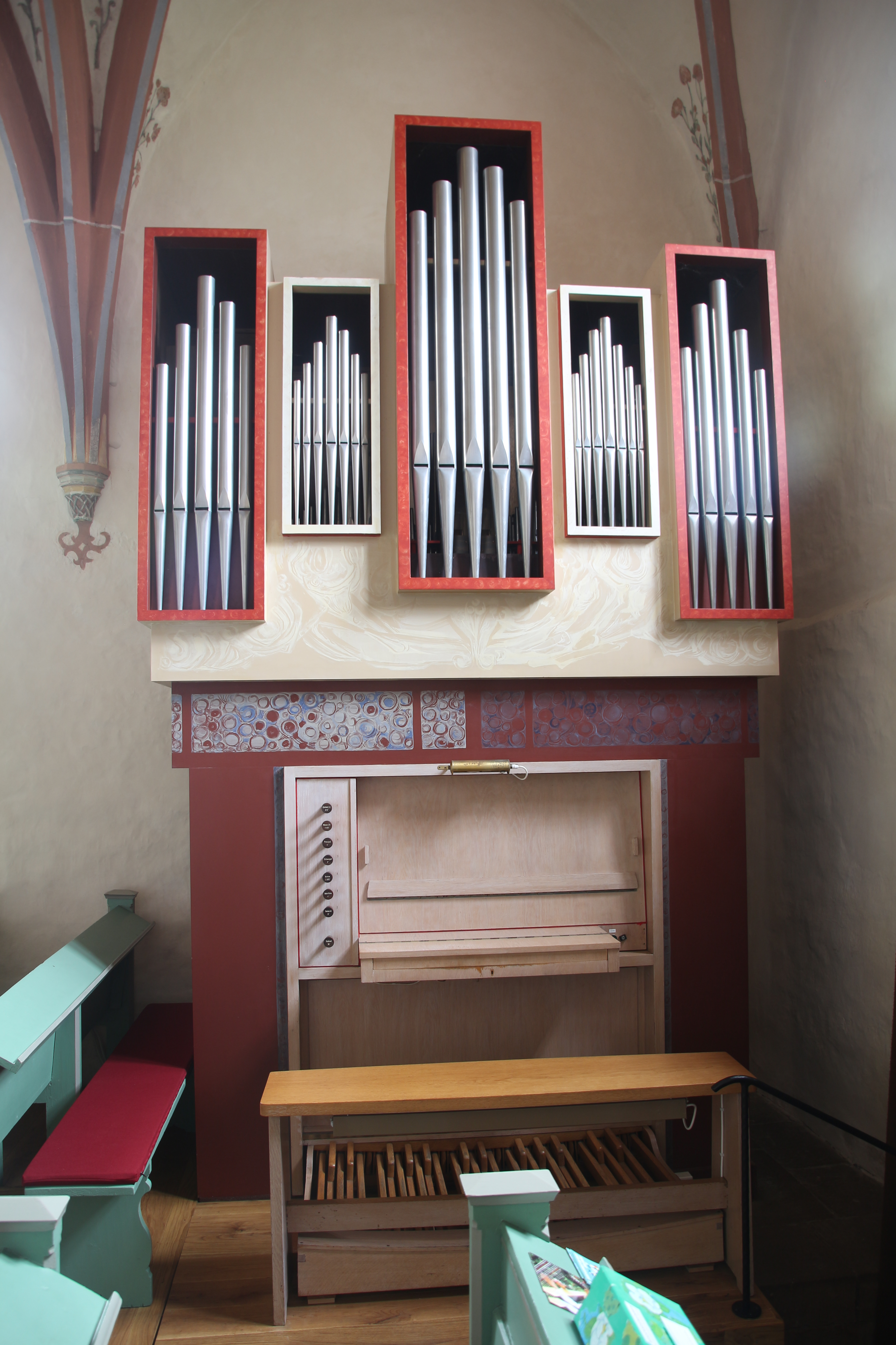 Siehe Bild und Dateiname